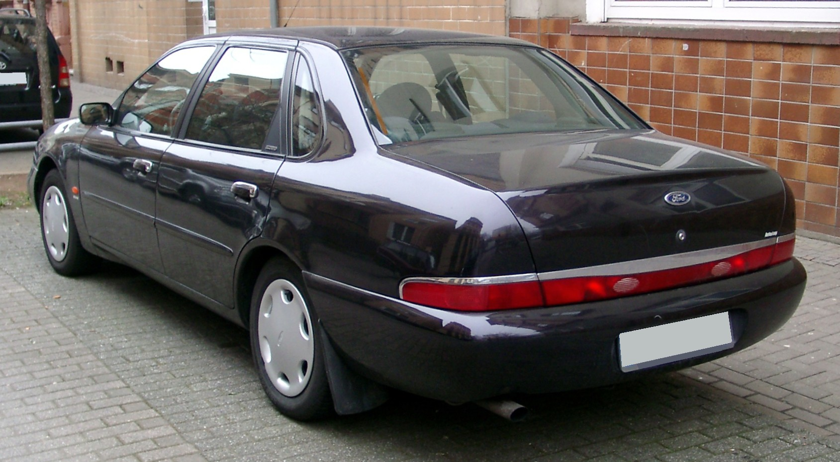 Ford Scorpio, 2. Generation